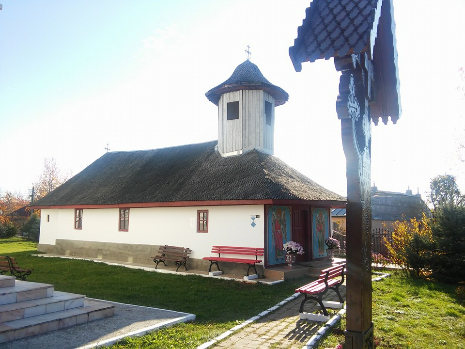 Biserica de lemn „Sf. Voievozi”